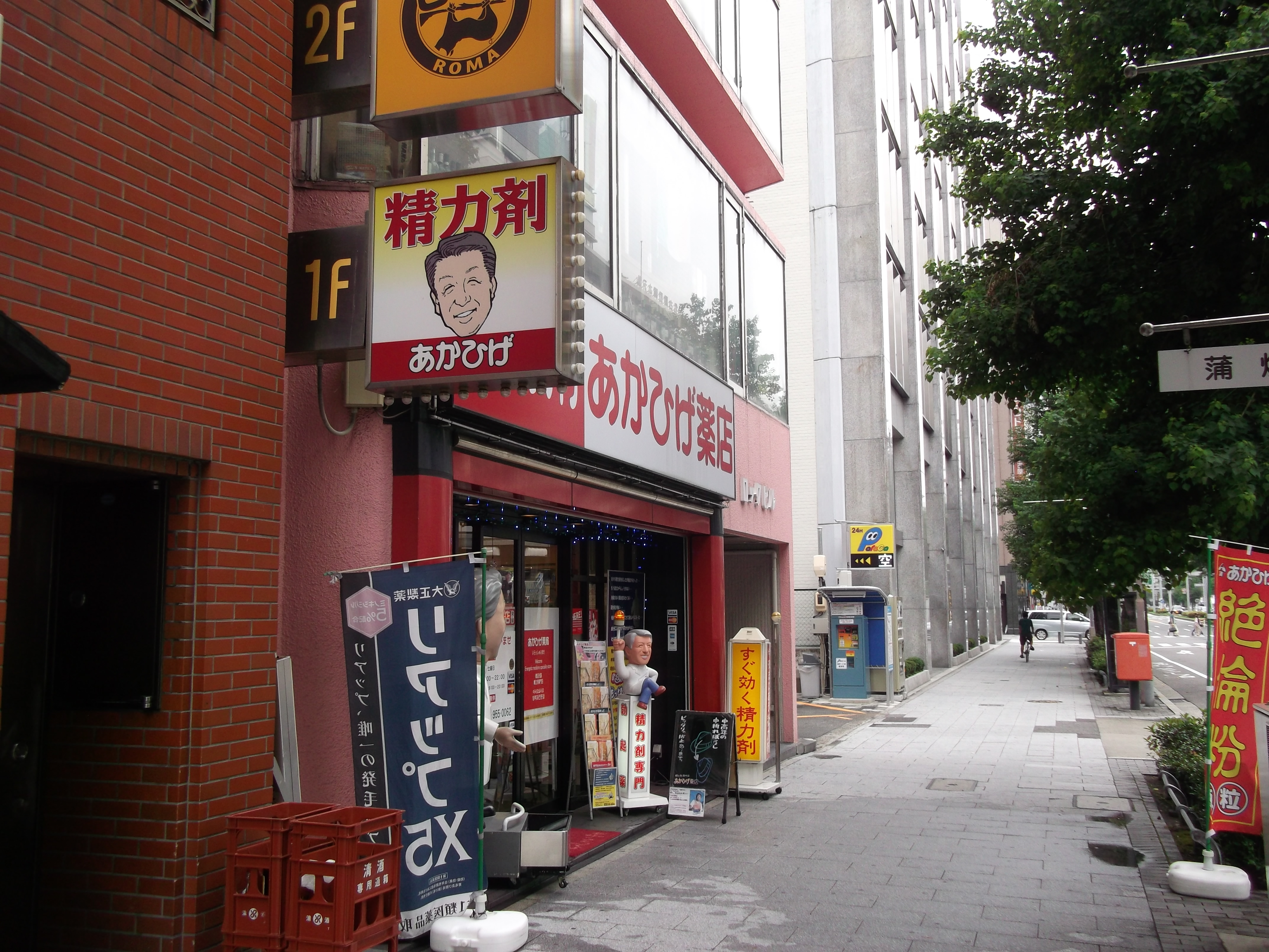 名古屋市中区錦のあかひげ薬店栄店を南側公道西側より撮影